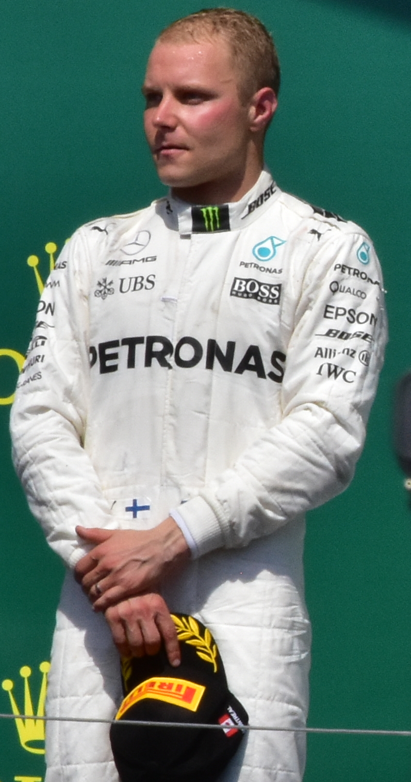 Grand Prix Canada 2017, Podium